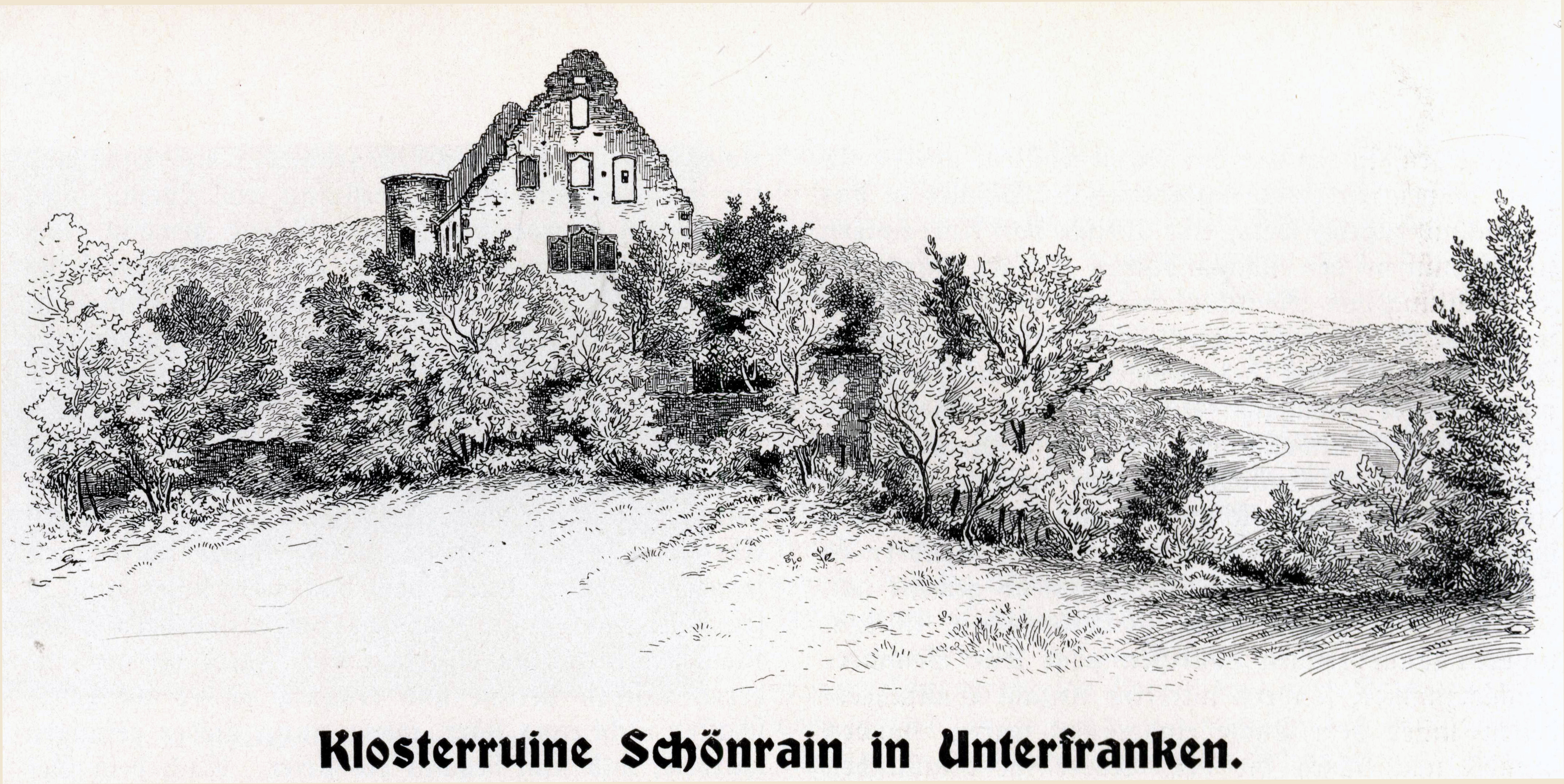 Klosterruine Schönrain in Unterfranken. Federzeichnung von K. Mörschell, Würzburg, um 1900. Abb. aus Wandern und Reisen: Touristik, Landes- und Volkskunde, Kunst und Sport. 1. Jahrgang, Düsseldorf: Verlag von L. Schwann, 1903, S. 296